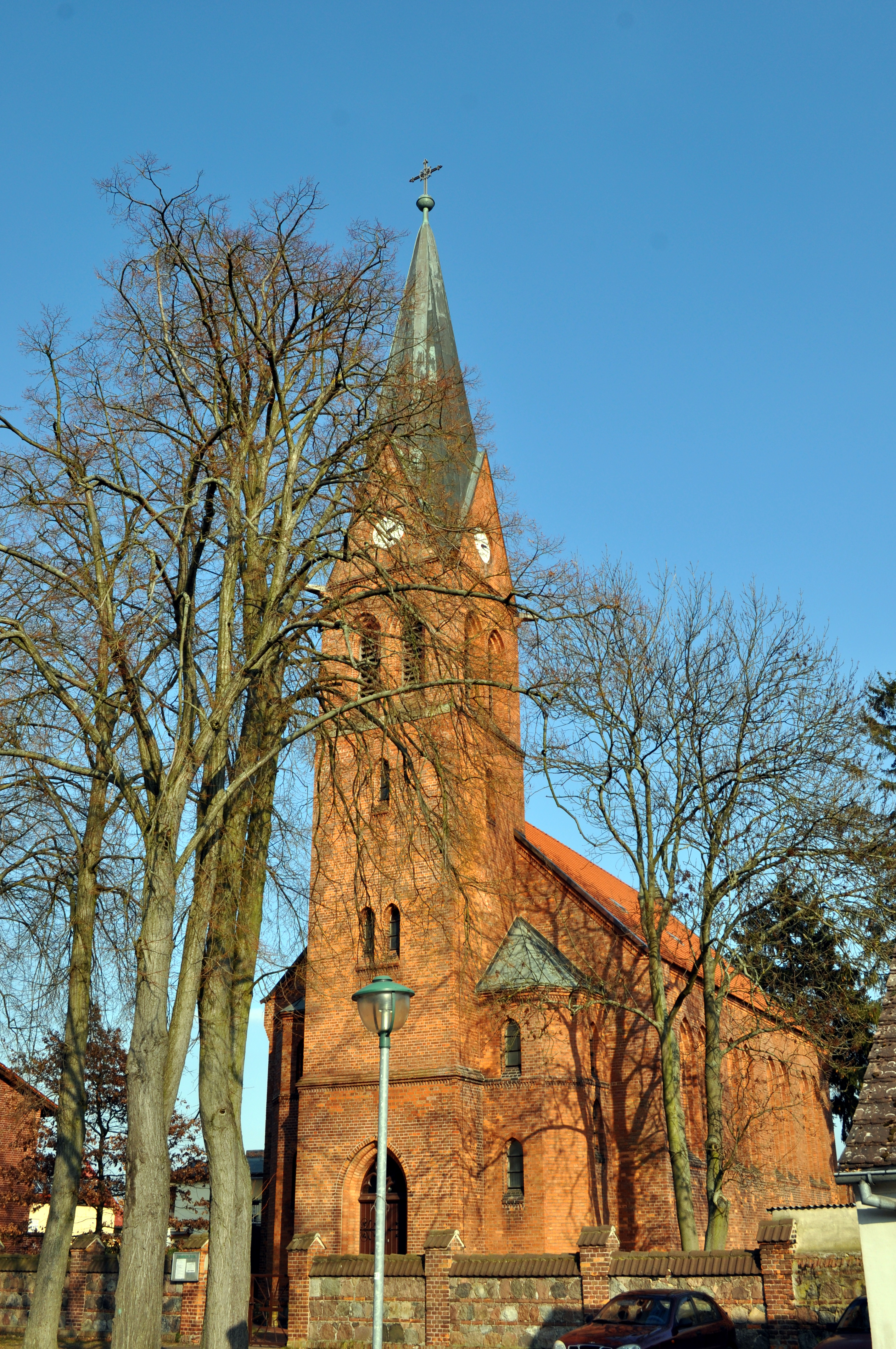 Die Kirche in Finowfurt an der Eberswalder Straße. Sie wurde Ende des 19. Jahrhunderts errichtet und wird von der evangelischen Kirchengemeinde Finow genutzt.